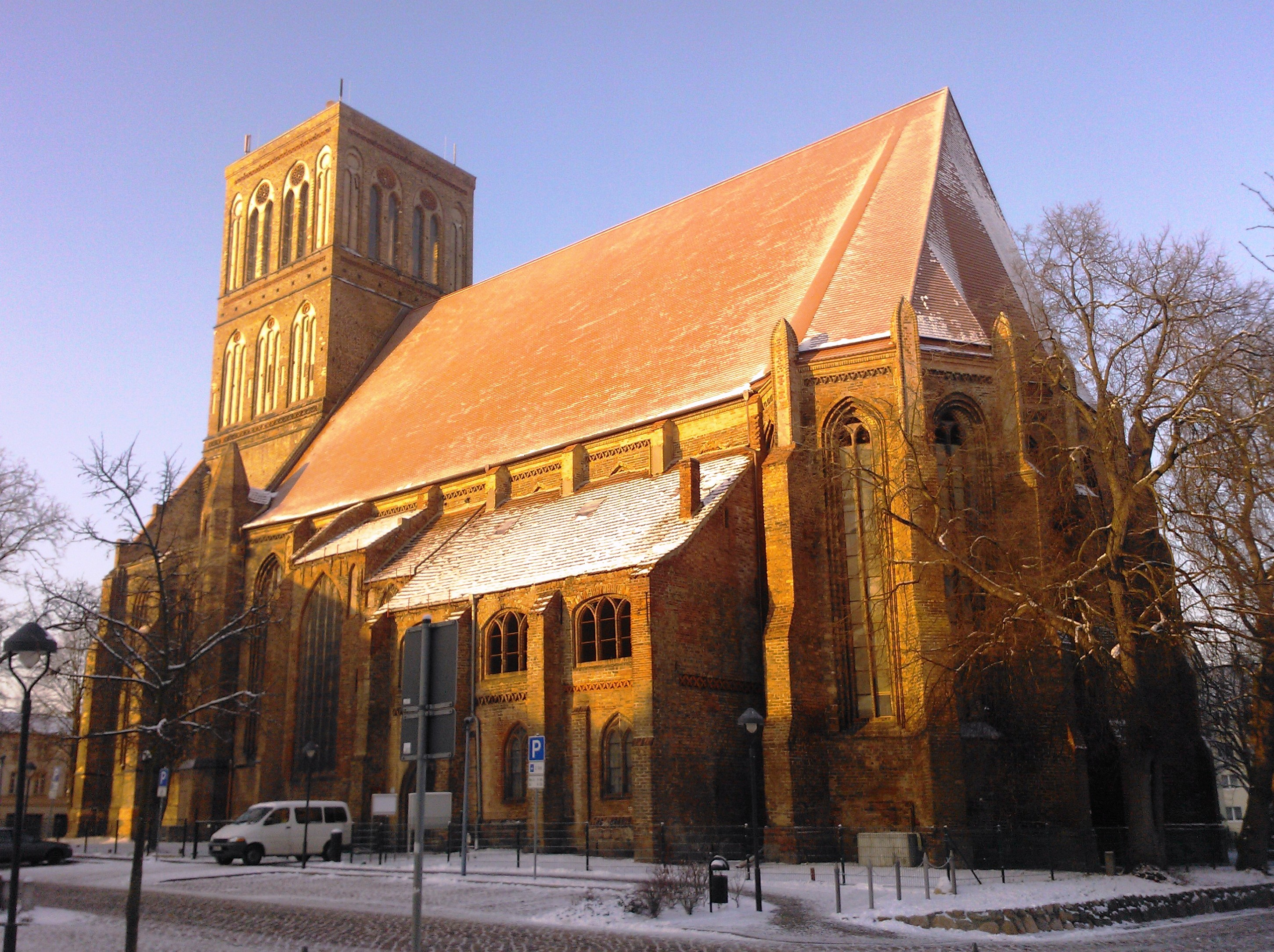 Nikolaikirche Anklam